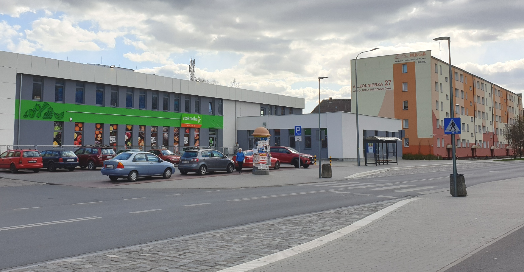 Osiedle Hallera. Bloki nr 25 i 27